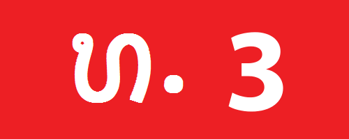 علامت جاده ملی شماره ۳ در لائوس